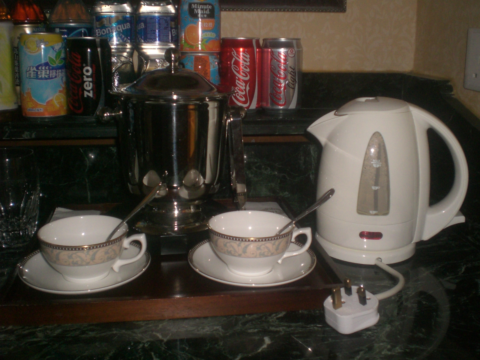 香港迪士尼樂園酒店zh:酒店客房 飲料 & 家電 茶壺 煲水 & BS 1363電制插頭 & Dudson牌子 杯